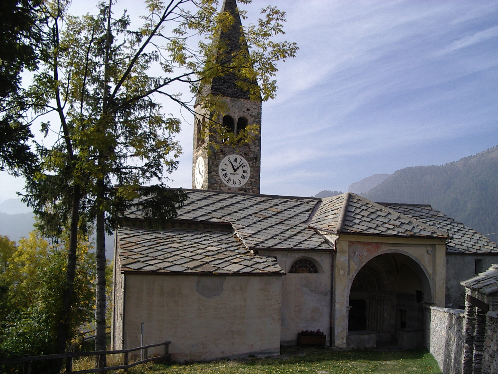 Chiesa parrocchiale di santa Maria Assunta, Elva, Provincia di Cuneo, Italia.